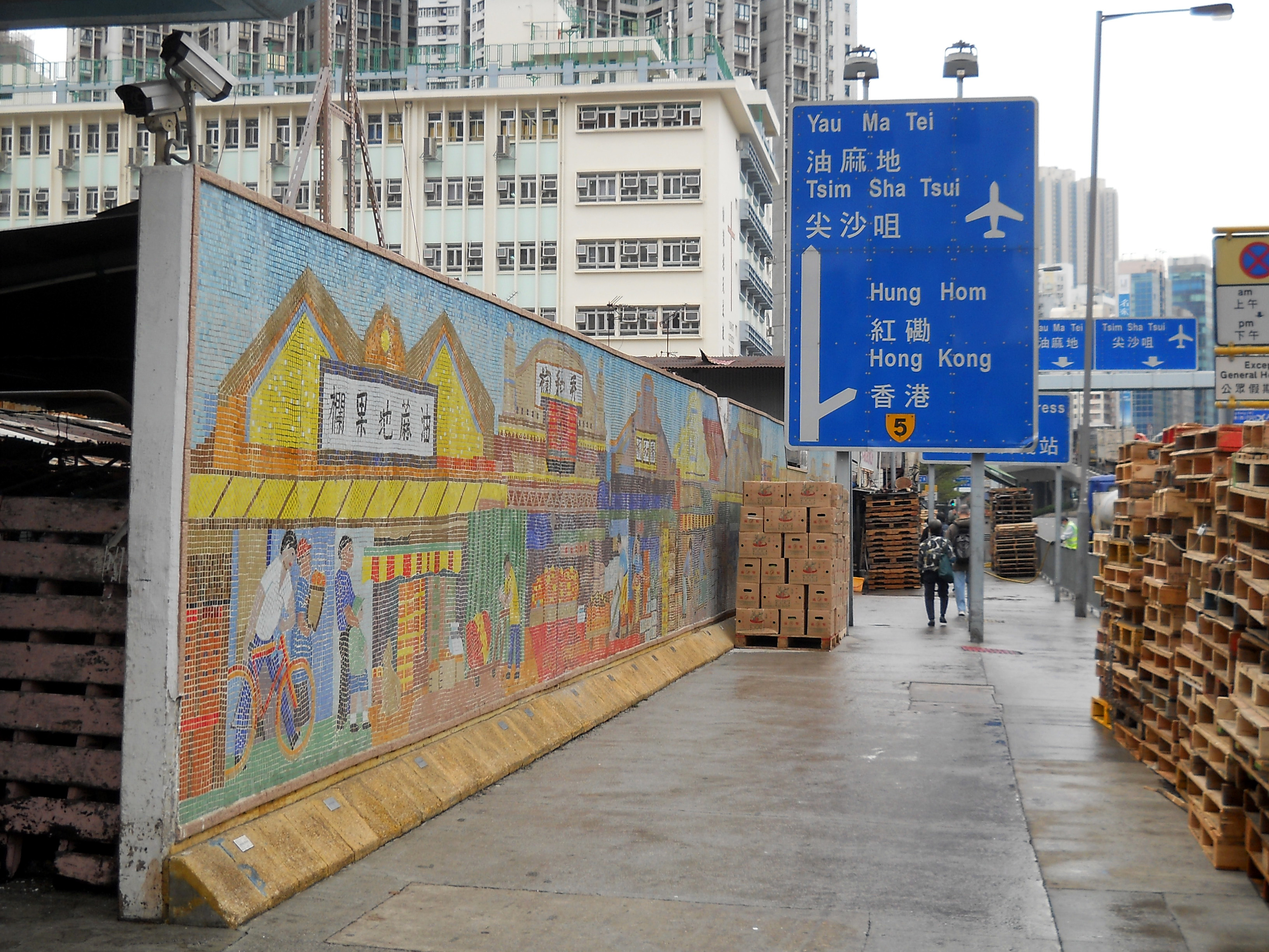 中文（香港）: 油麻地果欄面向渡船街外圍的壁畫